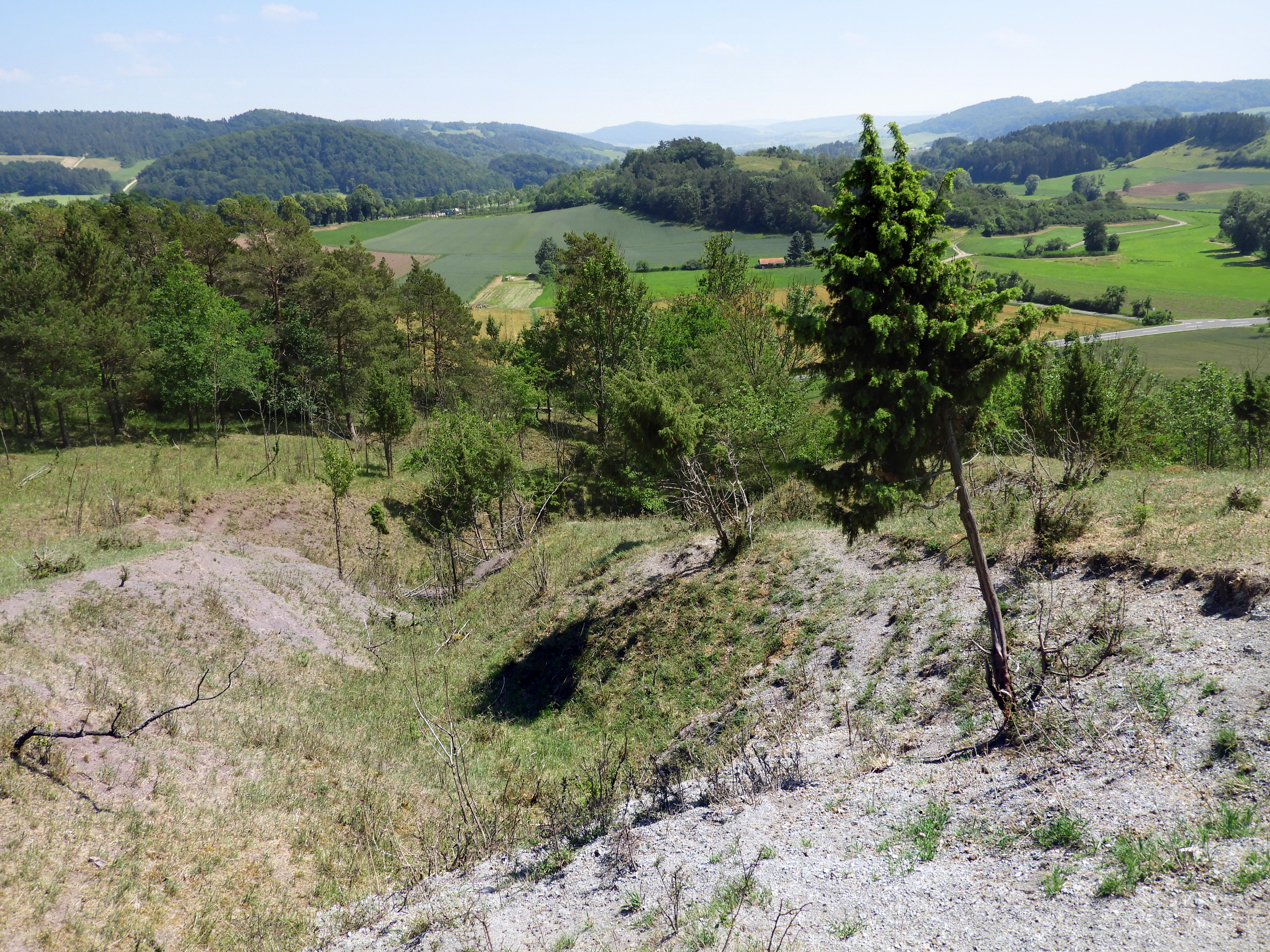 Erosionsrinne an der Ostseite des Weinbergs Das Naturschutzgebiet "Feuchtwiesen bei Lüderbach" liegt zwischen den Ringgauer Ortsteilen Rittmannshausen und Lüderbach im nordhessischen Werra-Meißner-Kreis, nahe der Landesgrenze zu Thüringen. Nordöstlich wird es von der Bundesstraße B 7 begrenzt. Geschützt werden der Feuchtbereich in der Tallage und die trockenen Waldbereiche am Weinberg. Der Bereich wurde in 1995 mit der nationalen Nummer 636027 und dem WDPA-ID-Code 163082 mit einer Fläche von 40,97 Hektar als Naturschutzgebiet ausgewiesen. Das Naturschutzgebiet wurde in 2008 in das insgesamt 185,04 Hektar große Fauna-Flora-Habitat-Gebiet "Wald südöstlich von Netra" Nr. 4926-304 integriert.